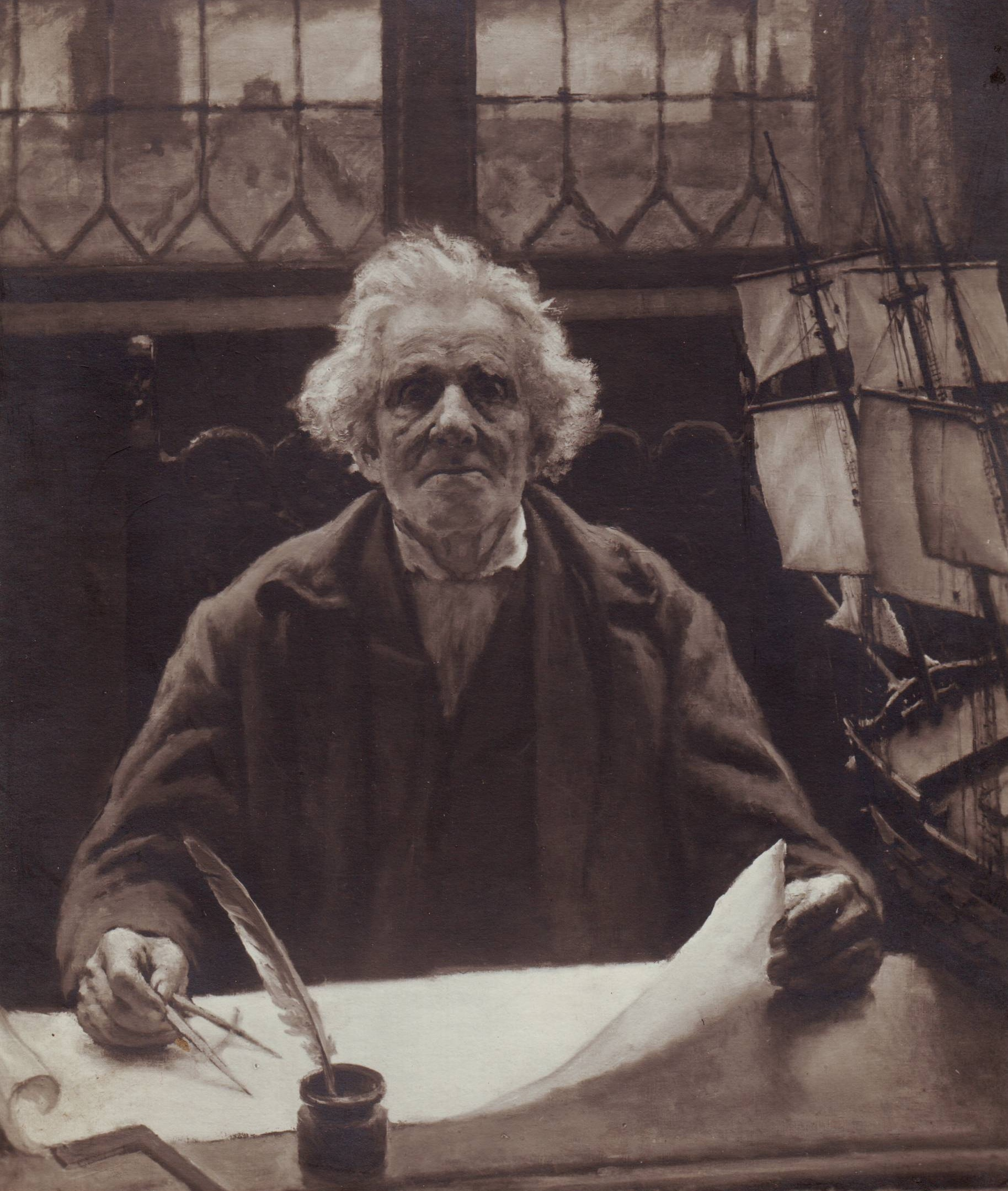 fotografie obrazu .A.Jelínka s názevem "Stavitel lodí"